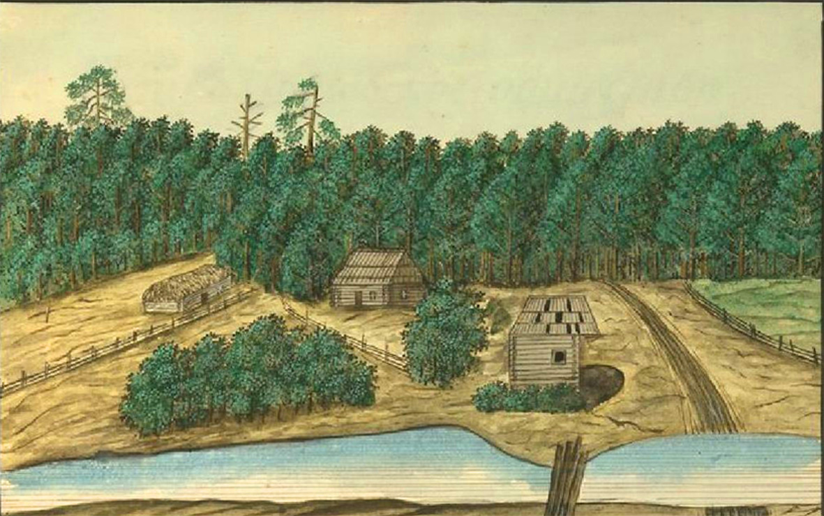 Пилипів Потік. Домінік П'єр де ля Фліз. «Медико-топографічний опис державних маєтностей Київської округи з зображенням деяких природних витворів рослинного і тваринного світу, разом із статистикою кожного села, їхнім виглядом, зробленим з натури, зображенням селянських костюмів та географічною картою Київської округи». Київ, 1854. - С. 722.